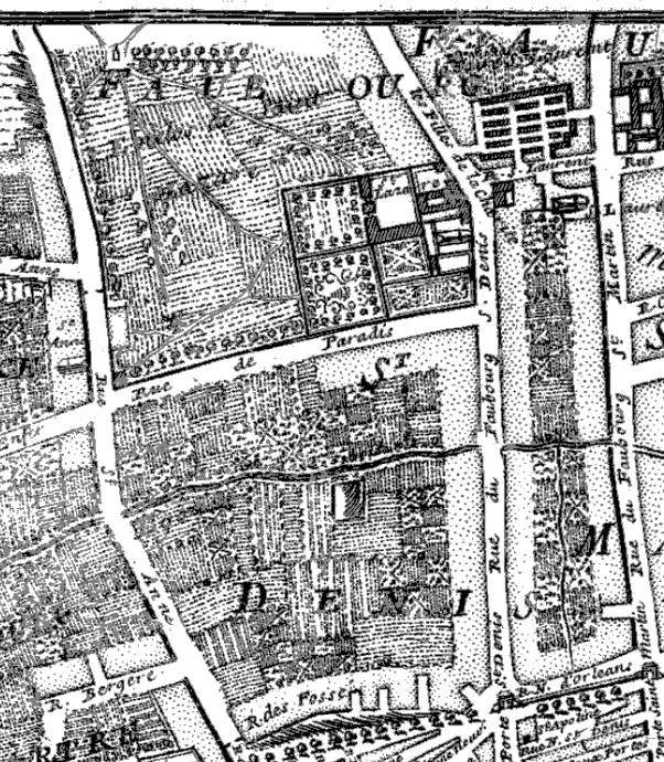 Paris : enclos Saint-Lazare en 1705. Pour toutes informations voir Image:Plan de Paris 1705 BNF07710700.png d'ou cette image est extraite.